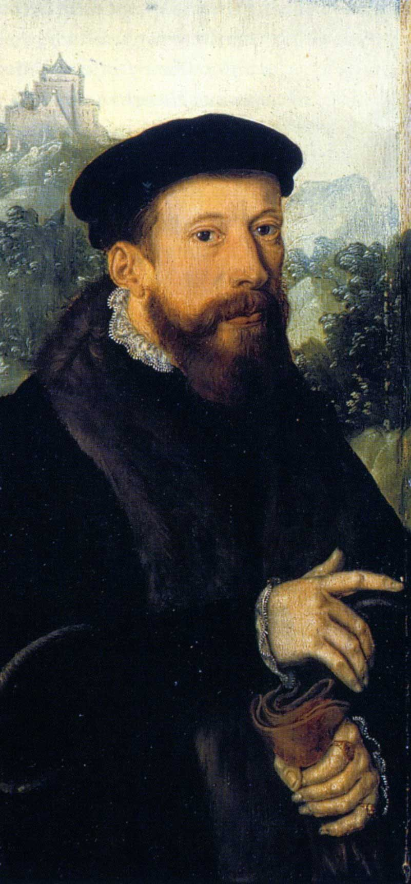 Portret van de Goudse burgemeester en schepen Jan Jacobsz van Rosendael